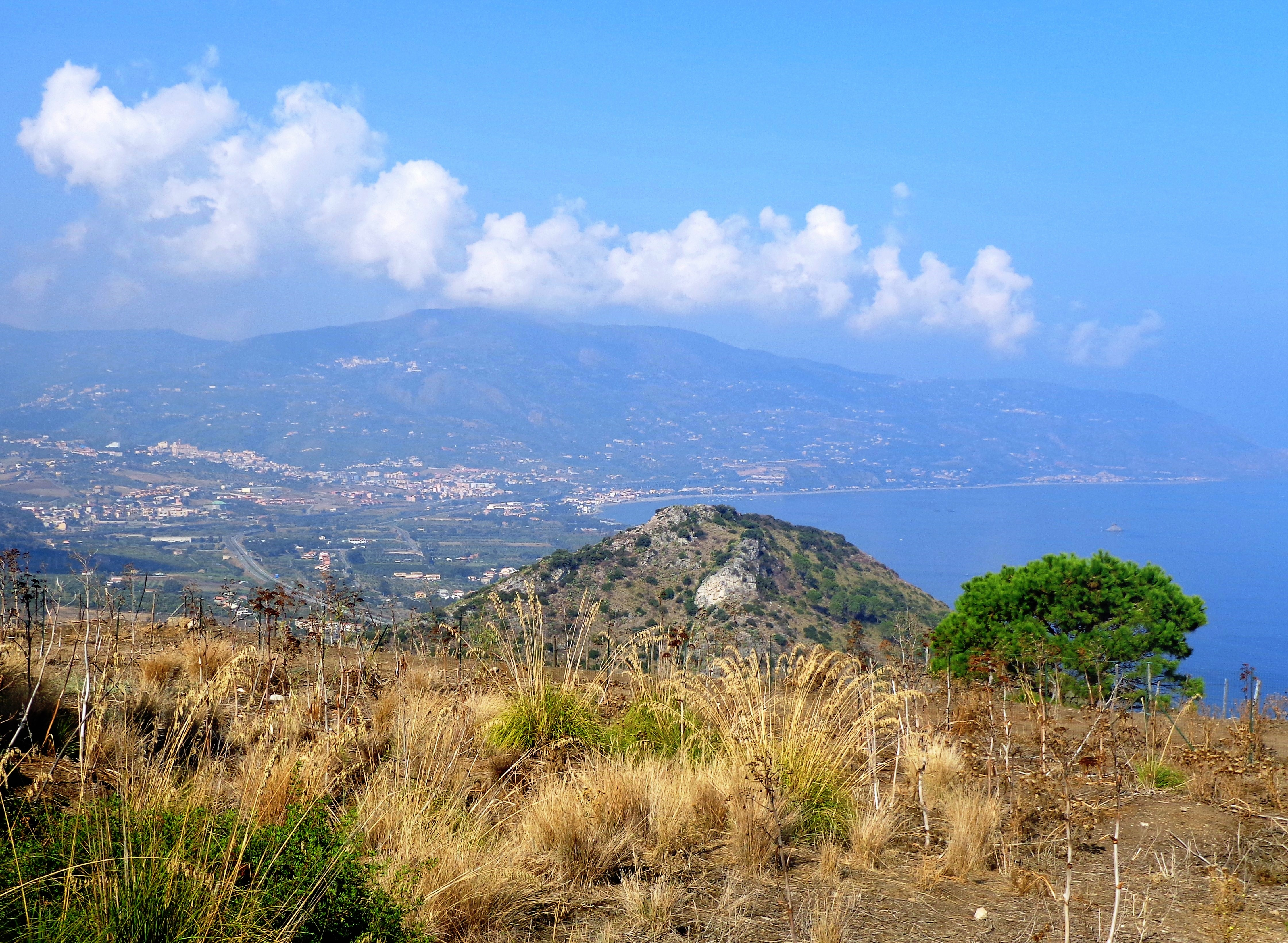 Strada imperiale, decumano. 13 settembre 2012 (Escursione Tindari, Santuario e area archeologica). Scatto fotografico altresì presente negli album caricati sui profili personali di Facebook, Panoramio, Google, etc.